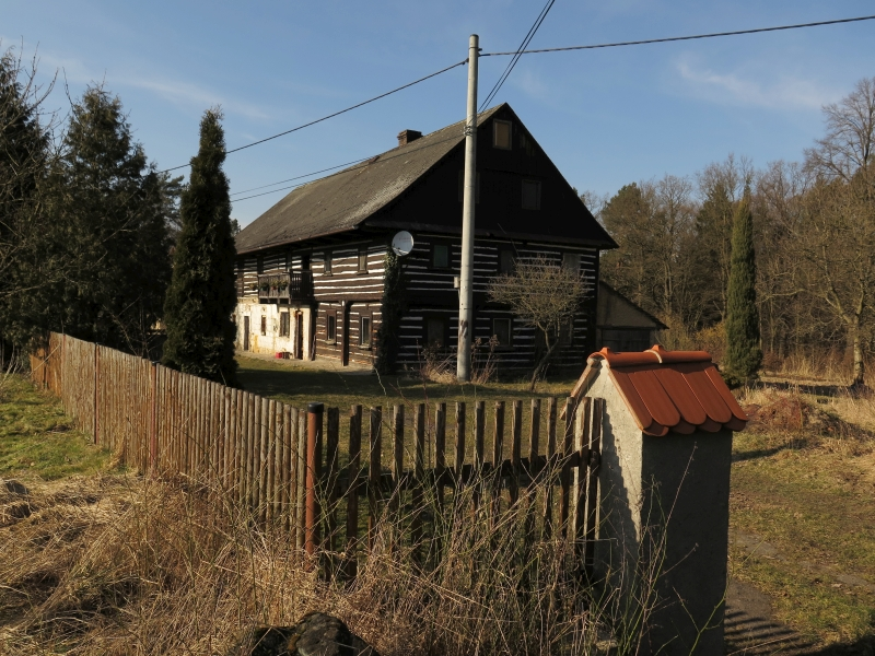 Usedlost čp. 5, Sušice 5, Sušice (Dubá).